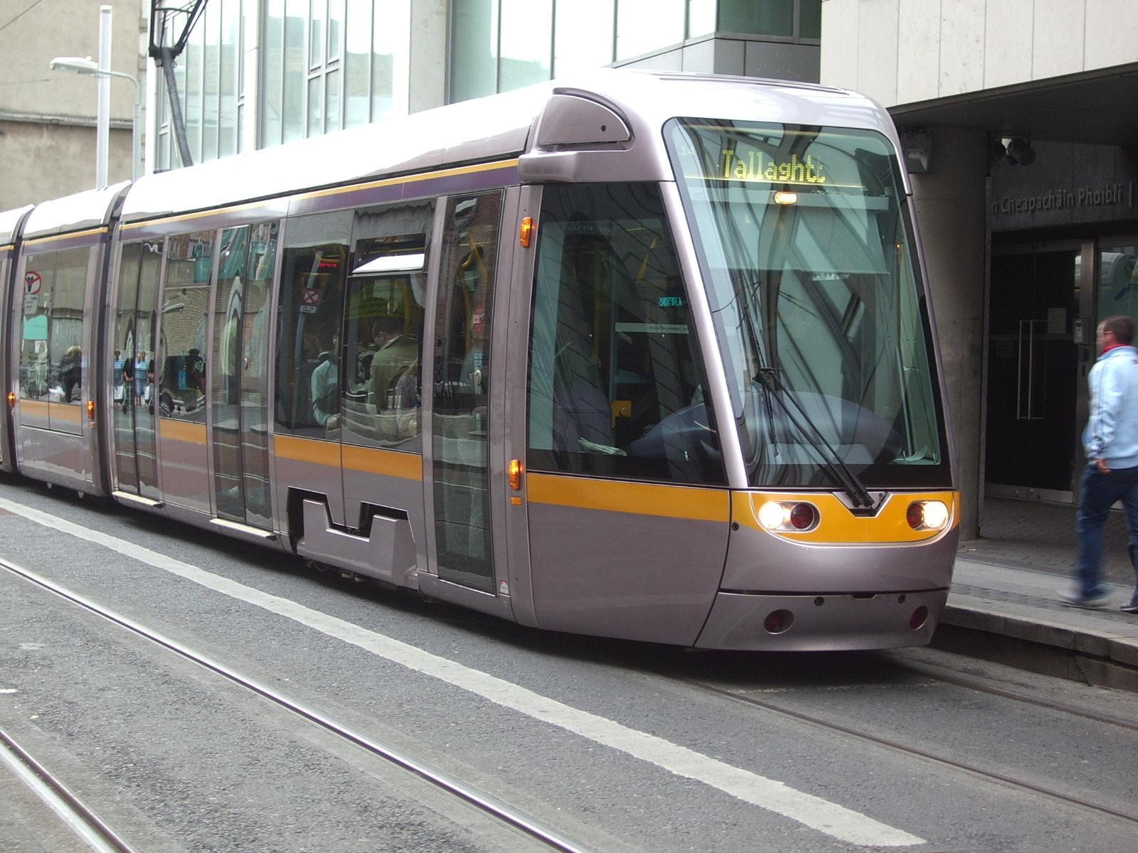 Lua in Dublin